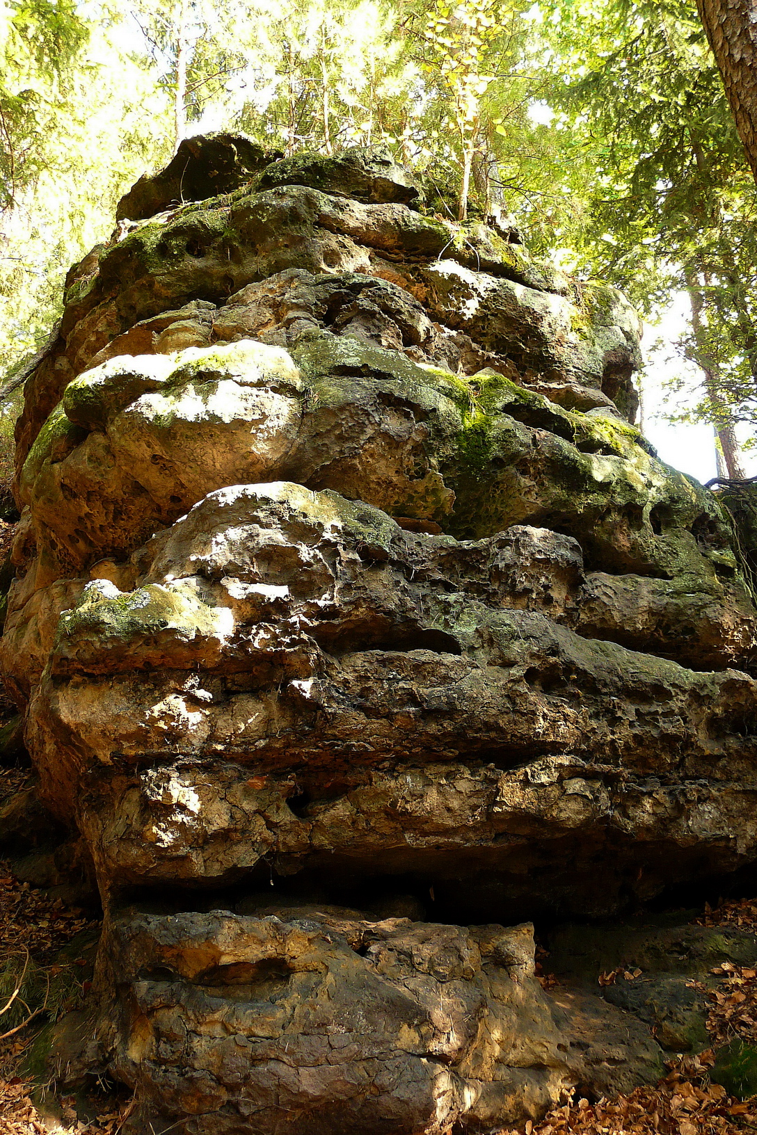 Pískovcová věžička na Zlatém vrchu